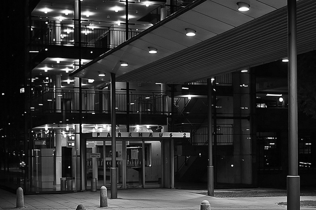 Das Parkhaus 2 (P2) am Flughafen in Bremen